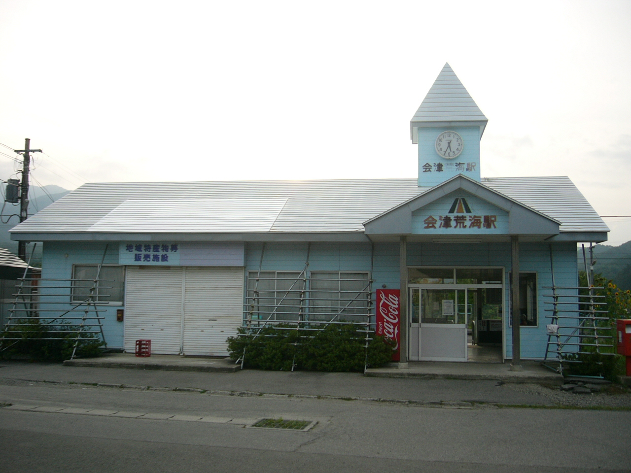 Aizuarakai Station